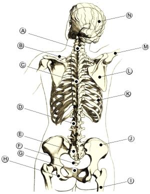 Układ kostny człowieka, widok od tyłu.